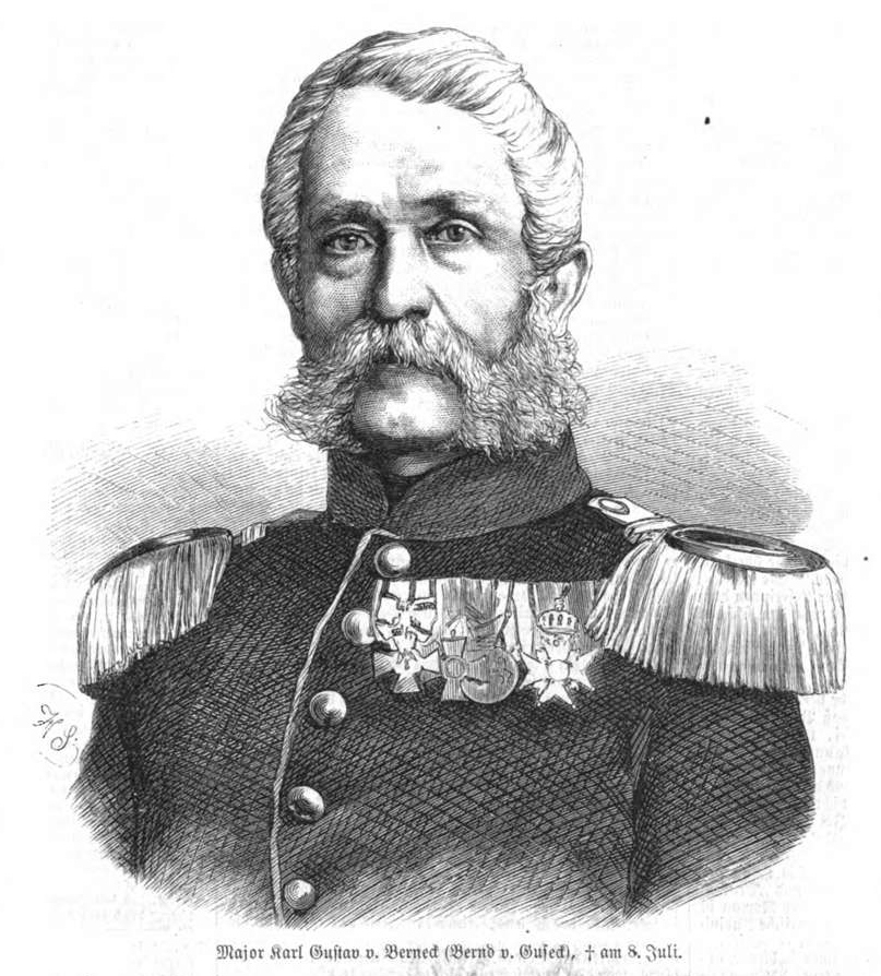 Karl Gustav von Berneck, preußischer Offizier und Schriftsteller im 19. Jh.